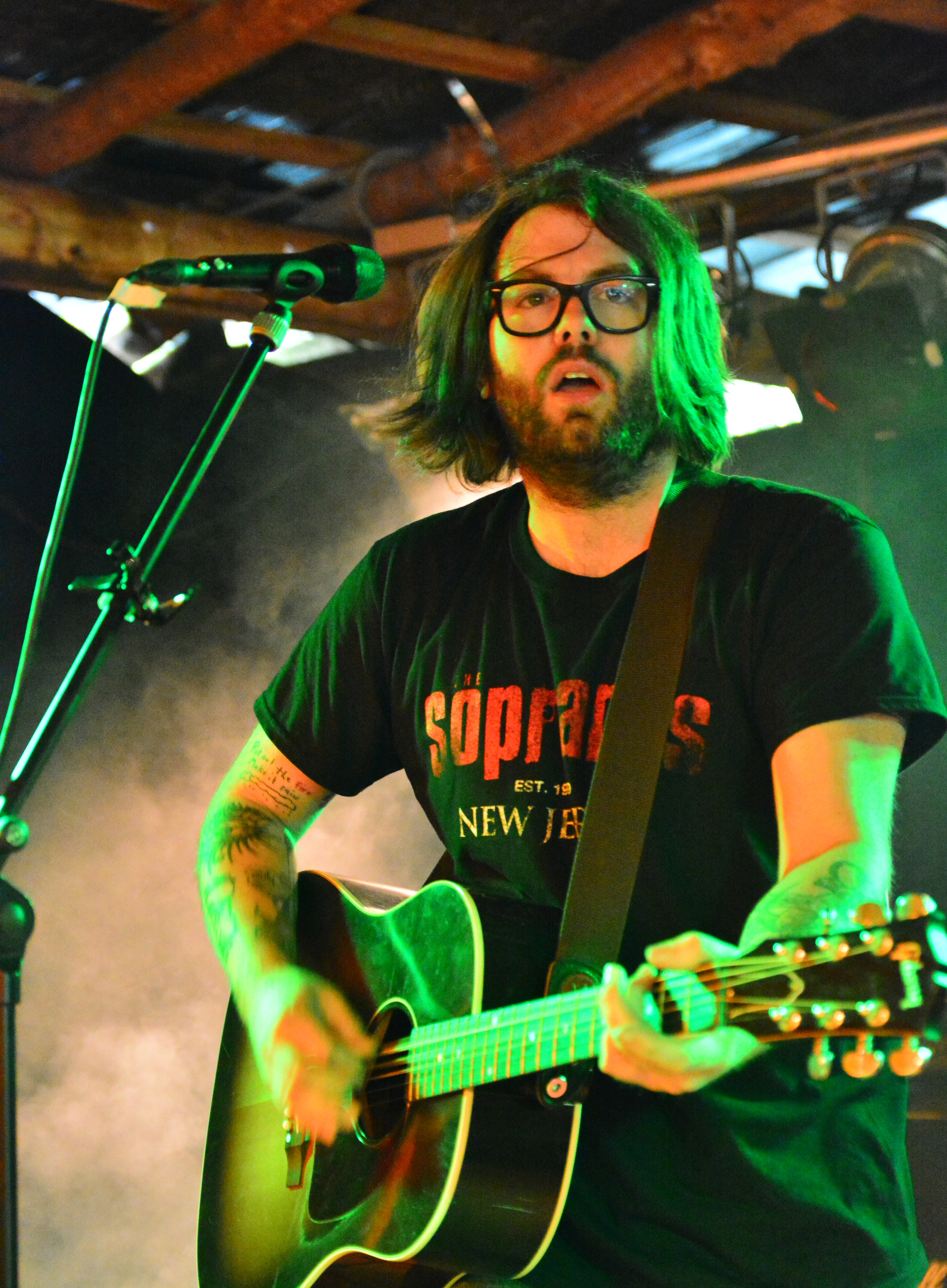 John Allen beim „Wilwarin Festival 2015“